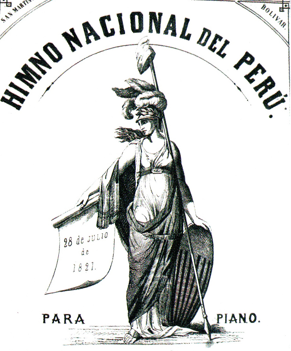 himno del Peru